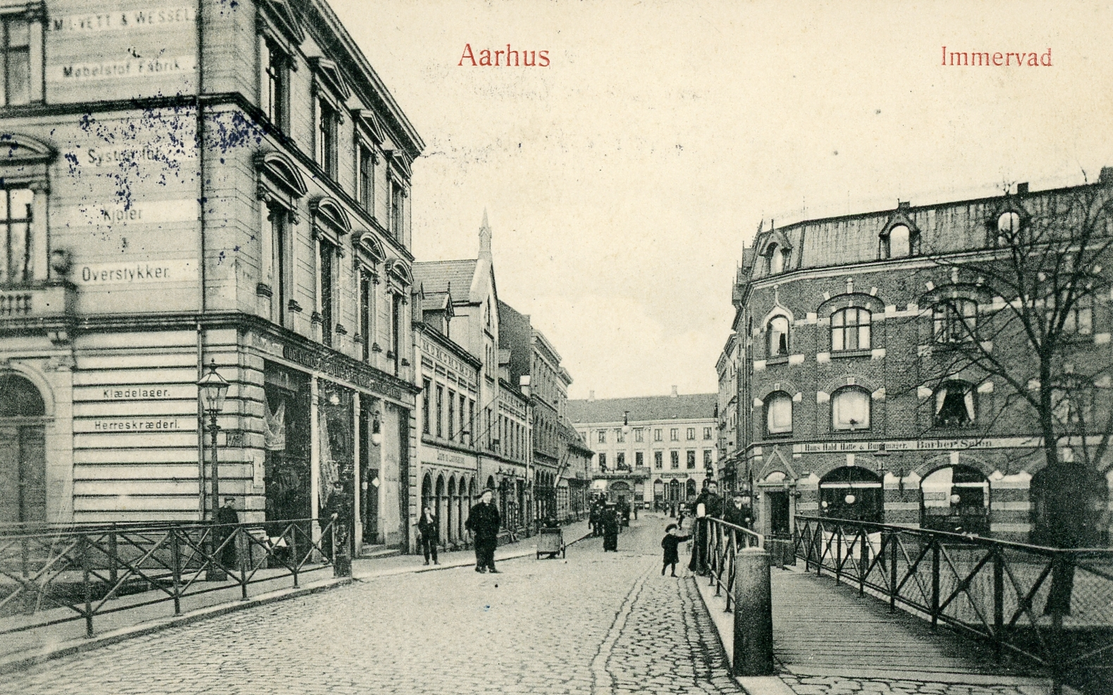 Frederiksbroen ved Immervad, Aarhus, 1907